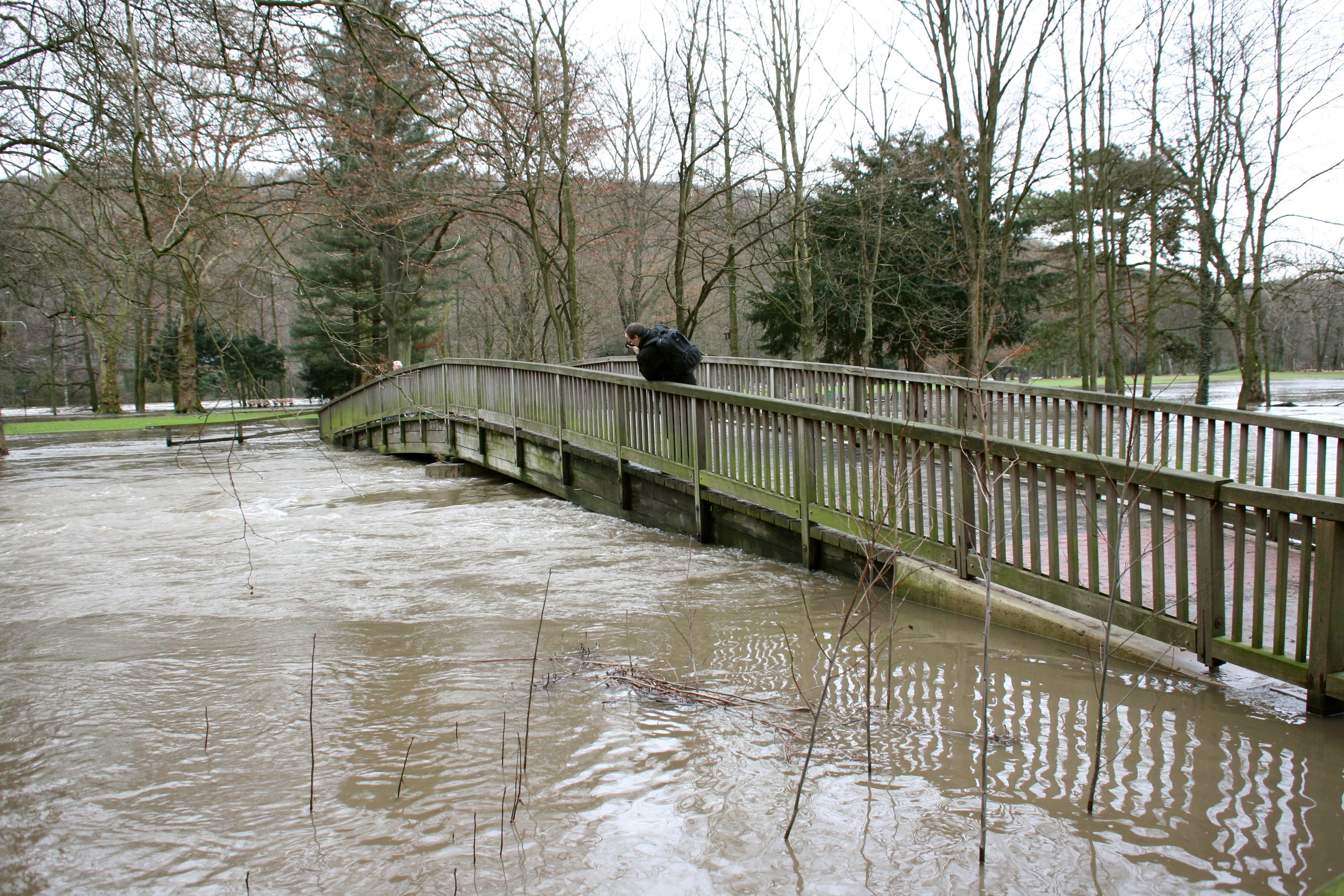 Joseph-Breuer-Straße und Brehminsel in Essen-Werden während des Hochwassers am 15.01.2011.